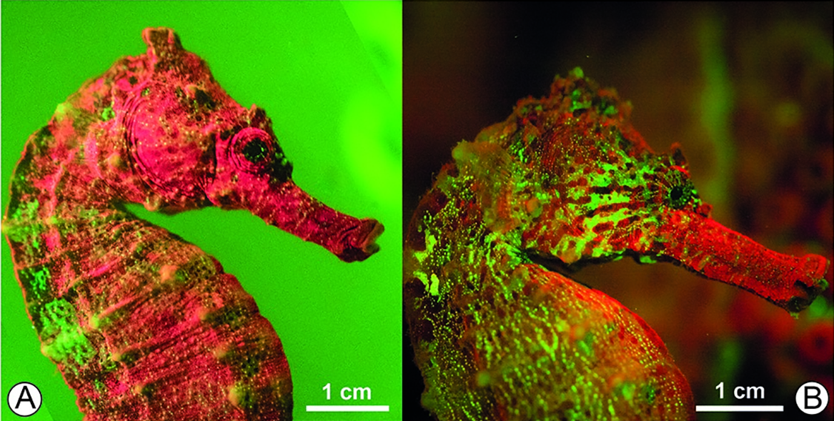 Fig. 2. Caballitos de mar en laboratorio y campo, que muestran biofluorescencia. Hippocampus reidi que exhibe biofluorescencia en espectro verde y rojo en condiciones de laboratorio (A) y campo (B). (A) Un caballito de mar macho de 101Template:Esdmm muestra puntos de biofluorescencia verde en las áreas del tronco y la cabeza, (B) Otro caballito de mar macho de 123Template:Esdmm muestra franjas de biofluorescencia verde en las áreas del tronco y la cabeza.